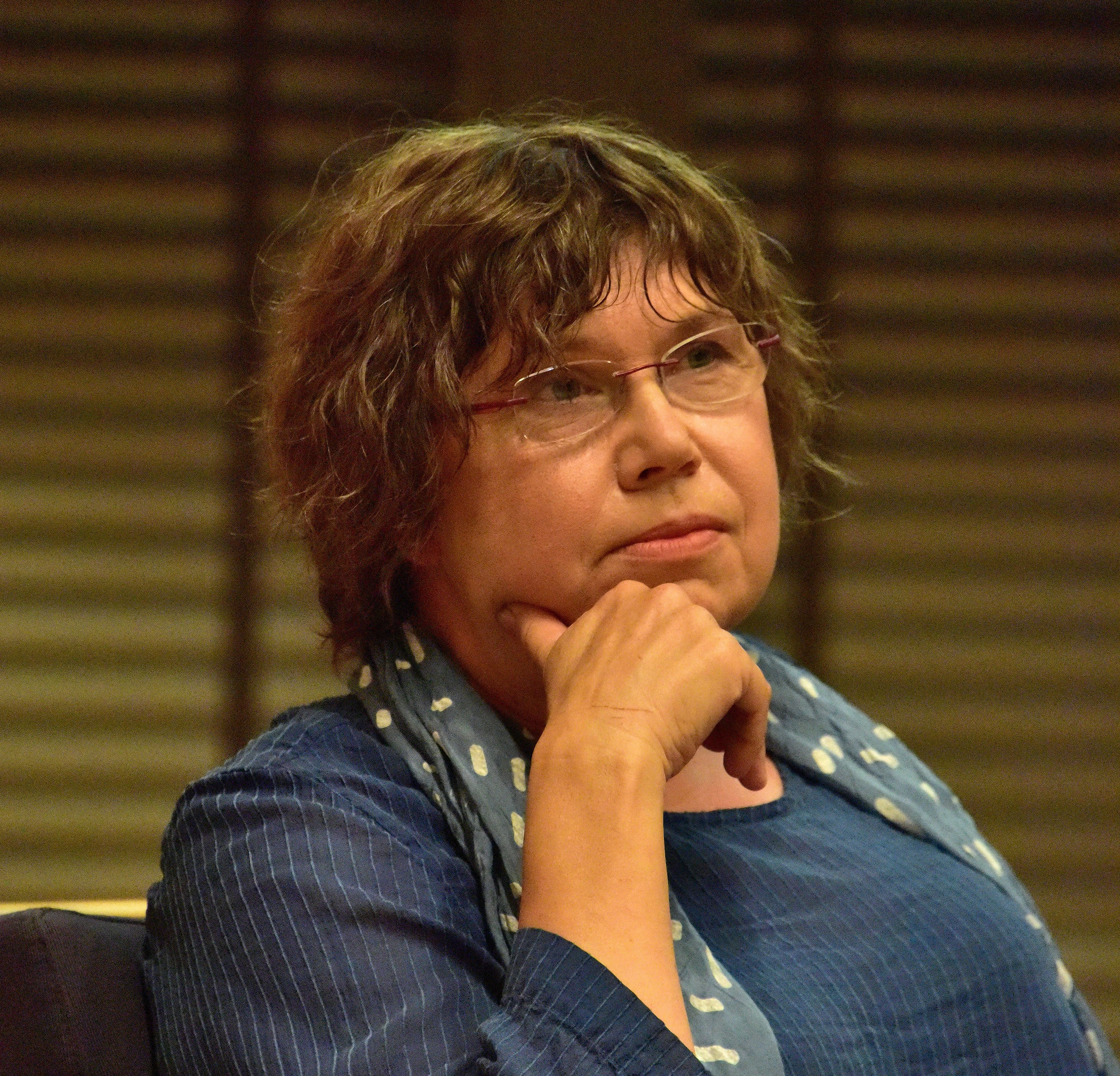 Profesor Barbara Engelking, Polska Akademia Nauk